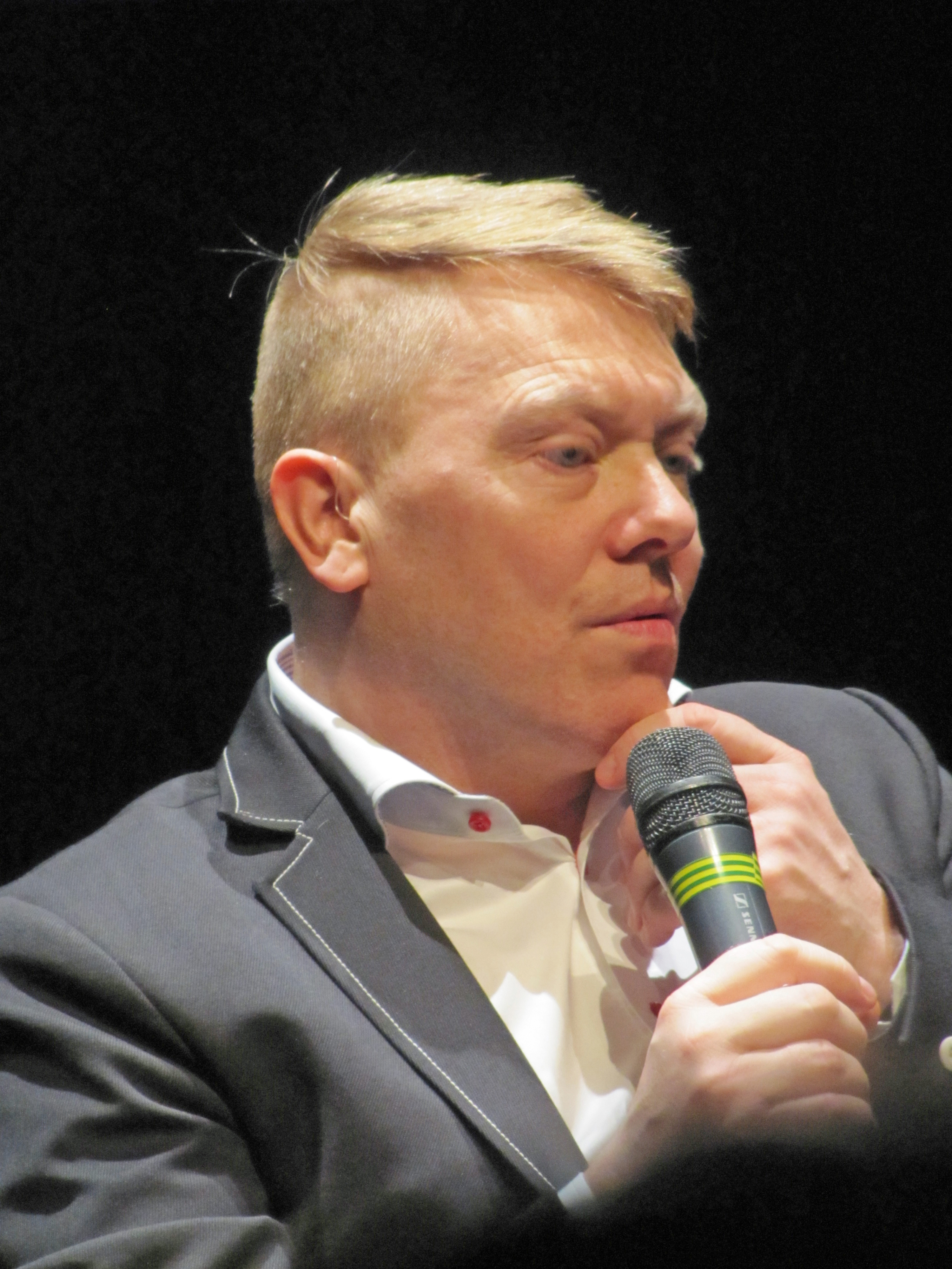 Jón Gnarr, 2011 in Frankfurt am Main.